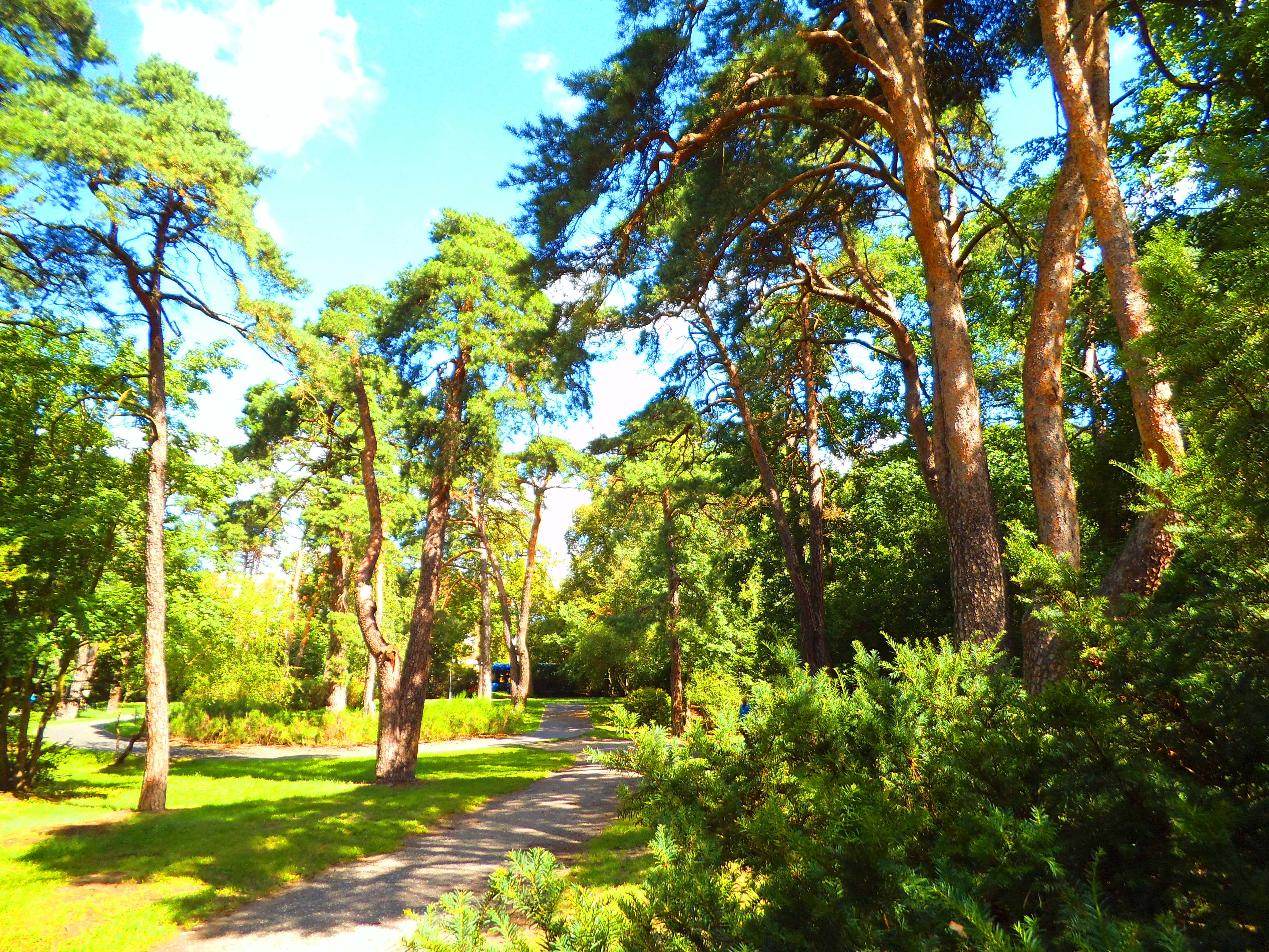 Park Miejski latem,Toruń